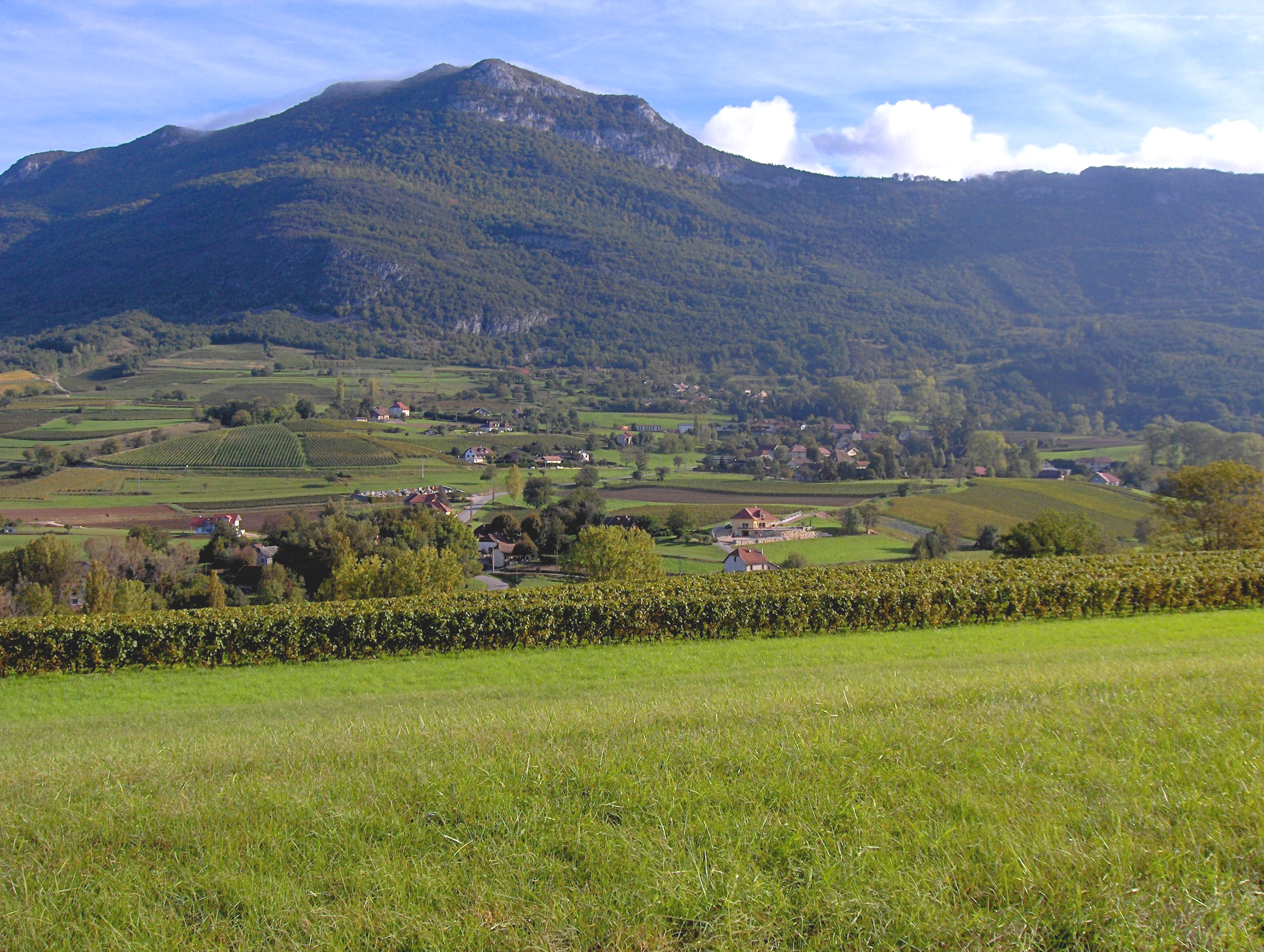 Le village de Billième situé sur les coteaux du mont de la Charvaz, dont on aperçoit les cîmes à l'arrière-plan à gauche.